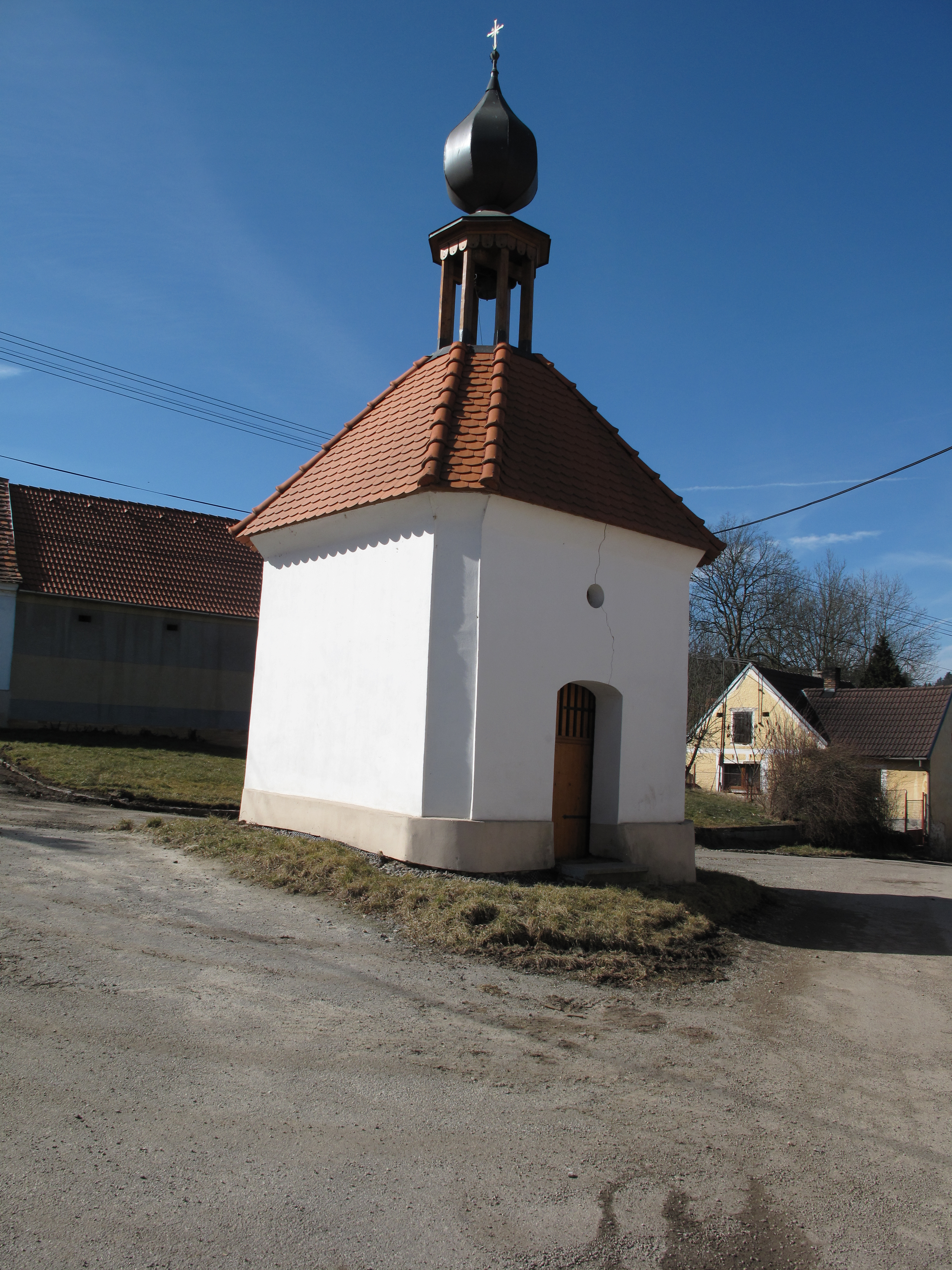 Dům ve Velkém Boru. Okres Prachatice, Česká republika.